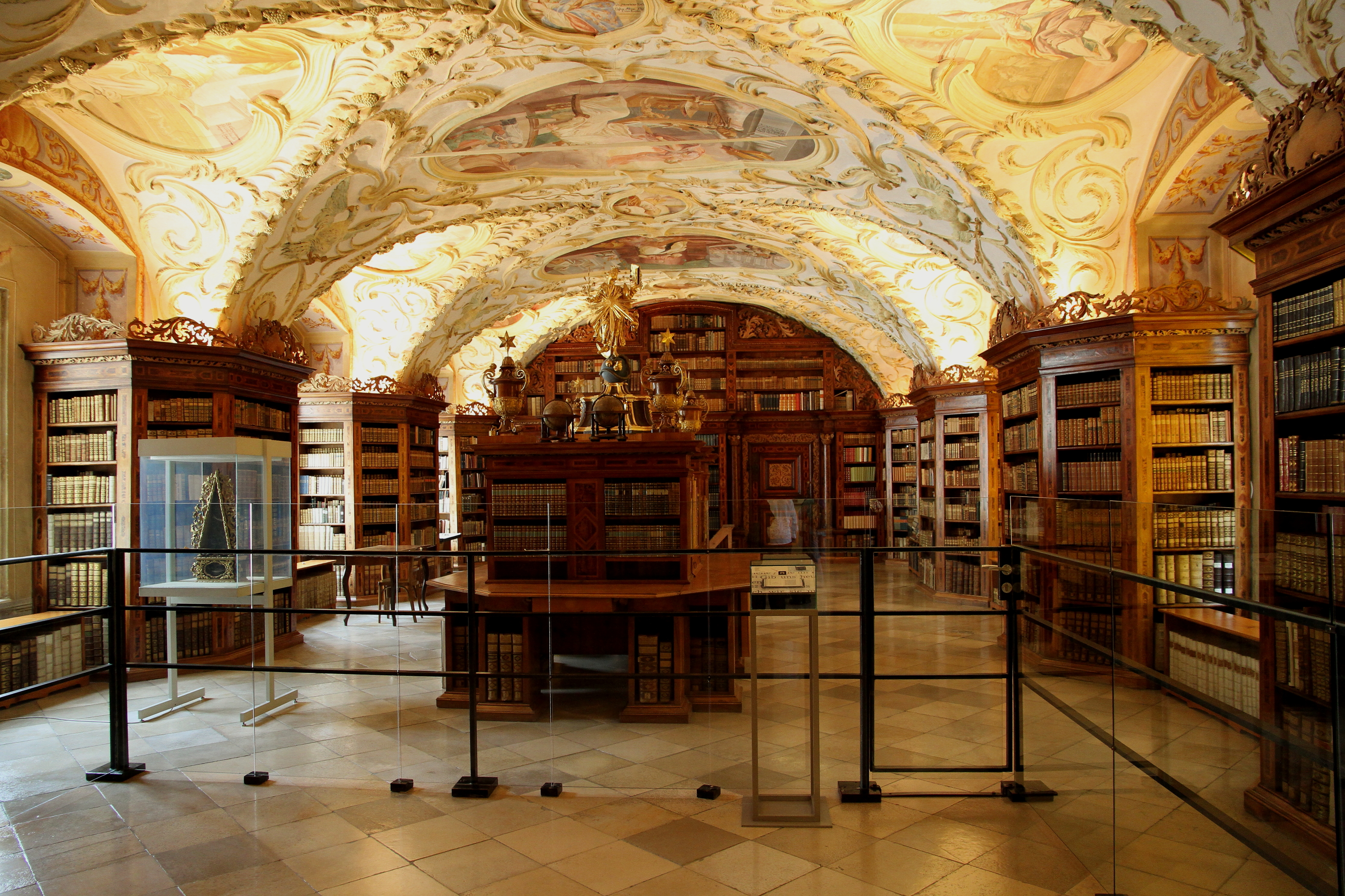 Hauptbibliothek des Stiftes Lilienfeld. Ein Prunksaal mit programmatischer Ausstattung, reicher plastischer Stuckdekoration und Malerei um 1700.